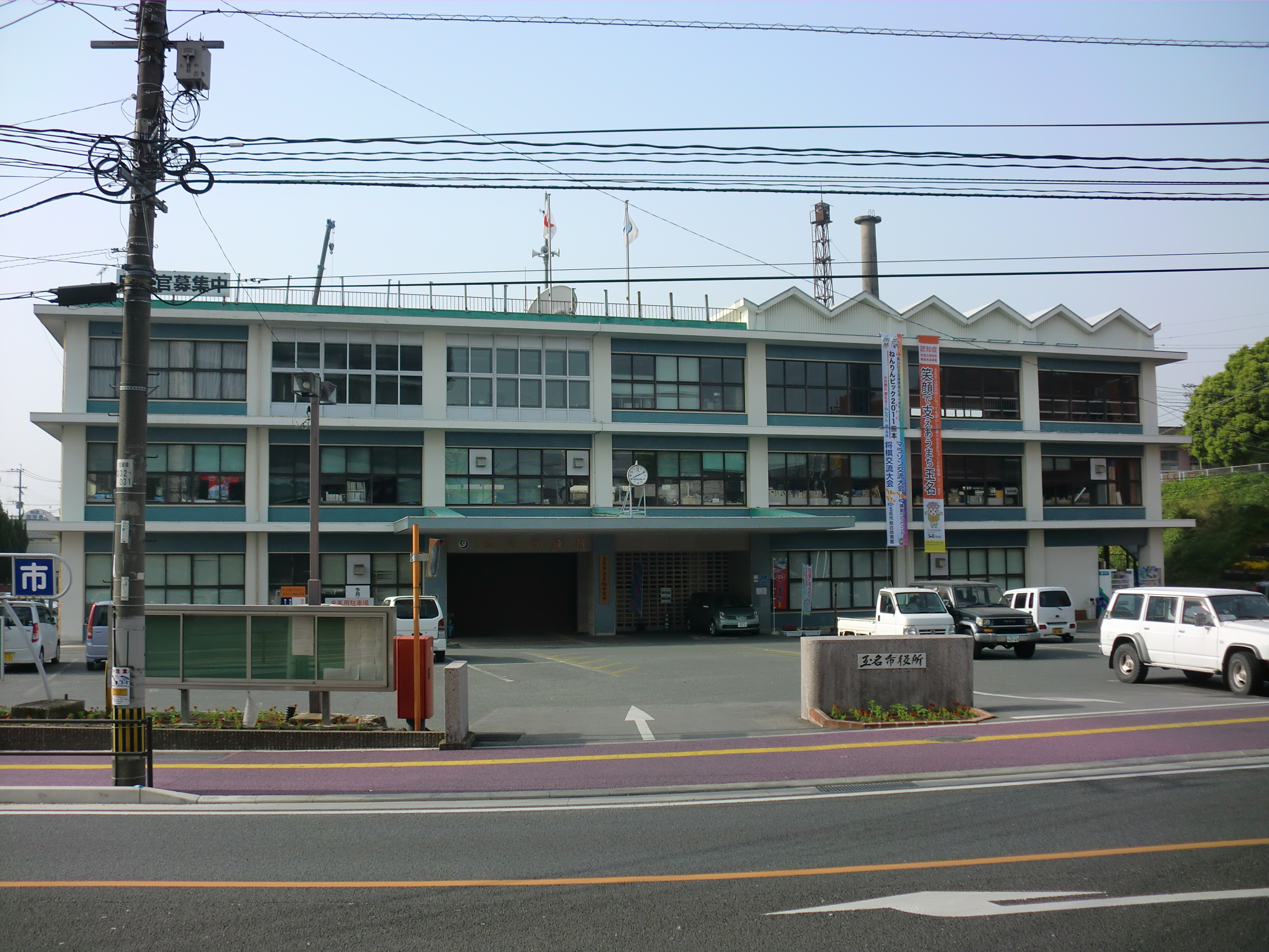 熊本県玉名市にある玉名市役所